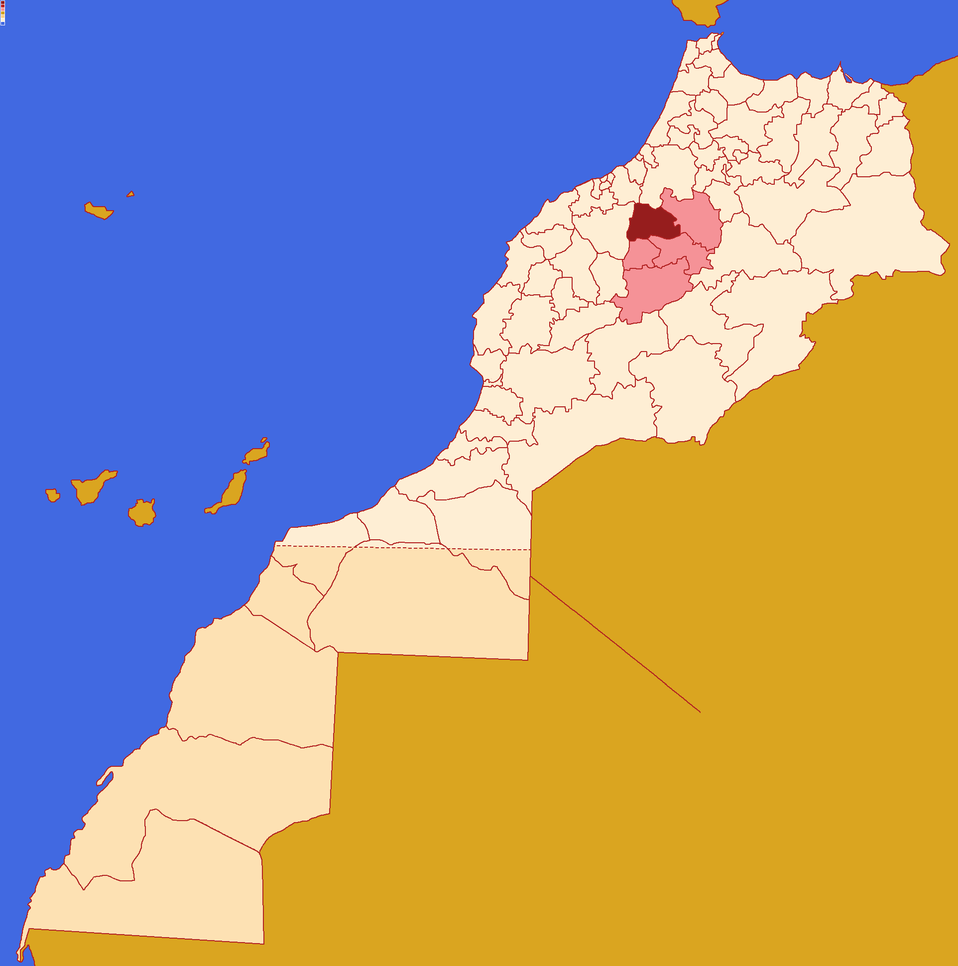 Localização da província de Khouribga ,dentro da região de Beni Mellal-Quenifra ,dentro de Marrocos.Conforme a reforma administrativa de 2015.